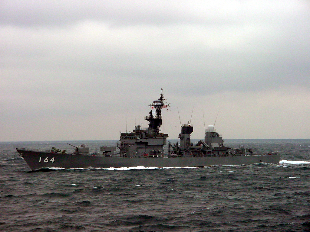 たかつき（2000年観艦式にて）